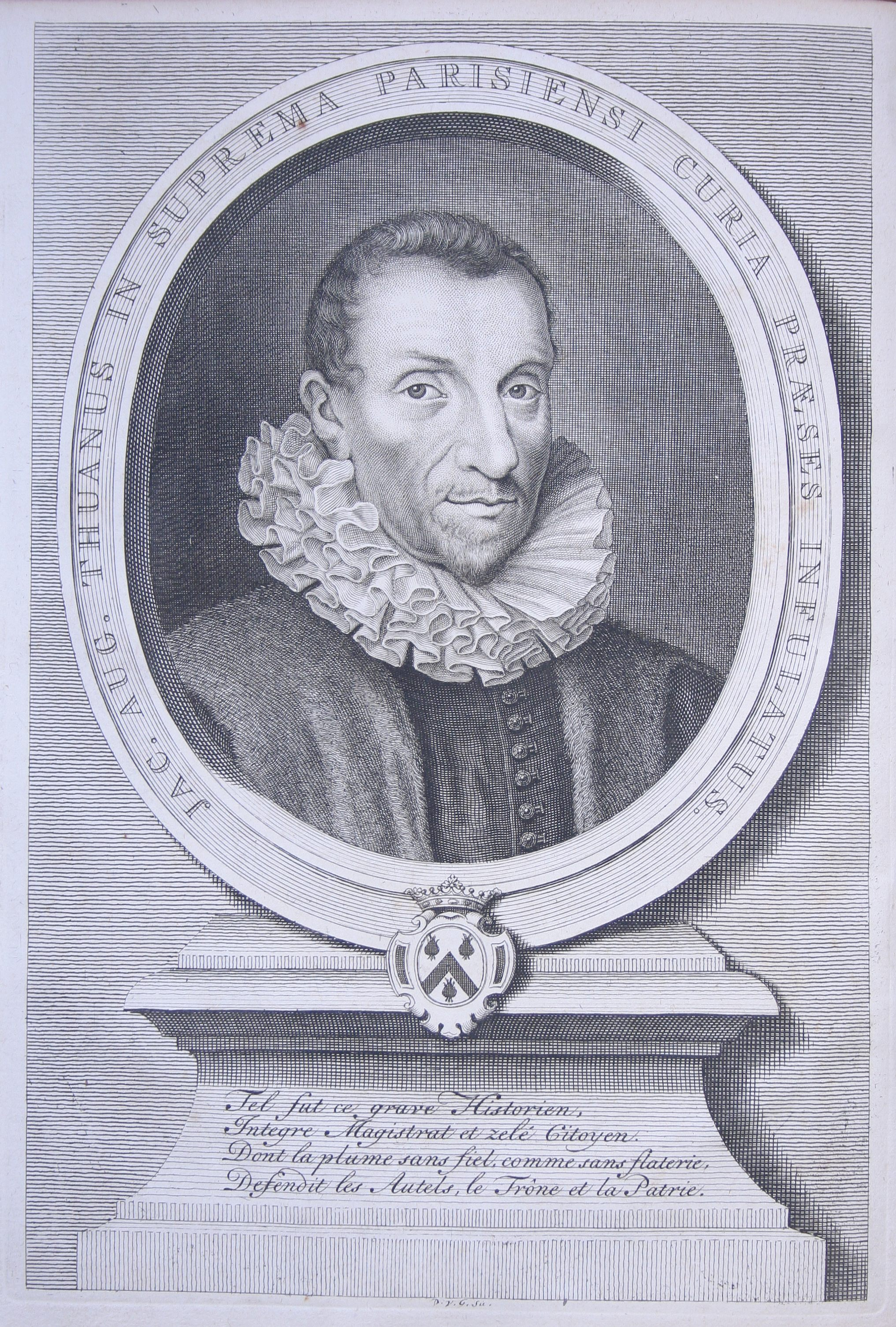 Jacques-Auguste de Thou (1533-1617) portrait en Frontispice de l'édition de 1740 de son Histoire universelle (exemplaire de la Bibliothèque patrimoniale de Gray (France)